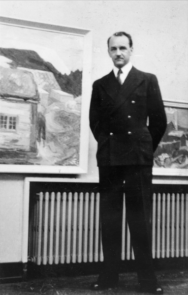 portrett, mann, kunstmaler, stående helfigur ved maleri.